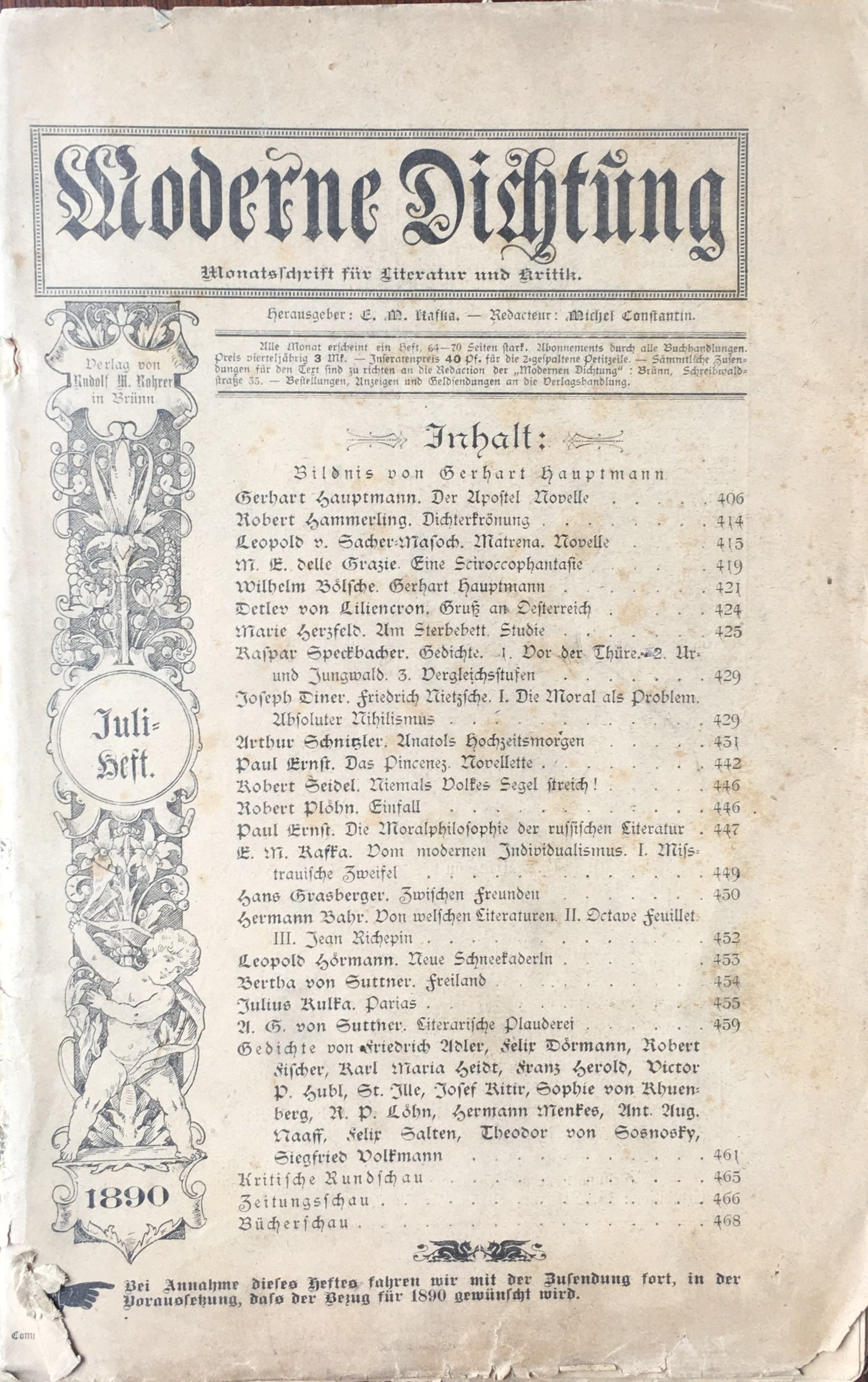 Umschlag des Band II, Heft 1, 1. Juli 1890